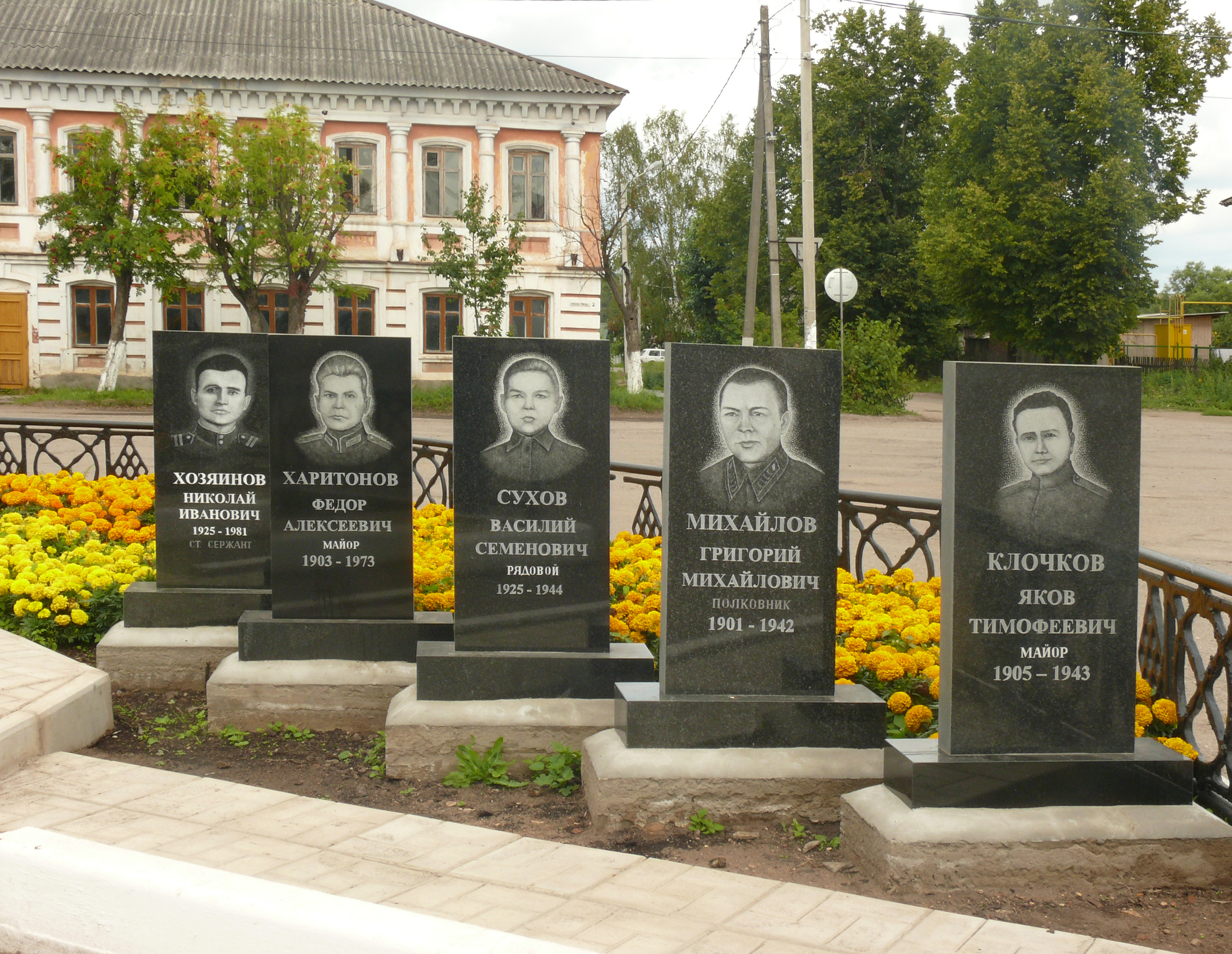 Памятные доски героям-сольчанам в городе Сольцы Новгородской области